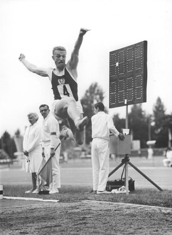 Klaus Beer Zentralbild Kutscher 5.7.70 Erfurt: XXI. DDR-Leichtathletik-Meisterschaften vom 3.-5.7.70-2.Tag. Im Weitsprung der Männer dominierte der Berliner Olympiazweite Klaus Beer (SC Dynamo) mit 8.10 m eindeutig. Beer hatte eine hervorragende Serie: 8.05 - 8.10 - 8.09 - ungültig - 7.91 - 8.05. Er erhielt wie die anderen Sieger den verdienten Beifall der rund zehntausend Zuschauer.